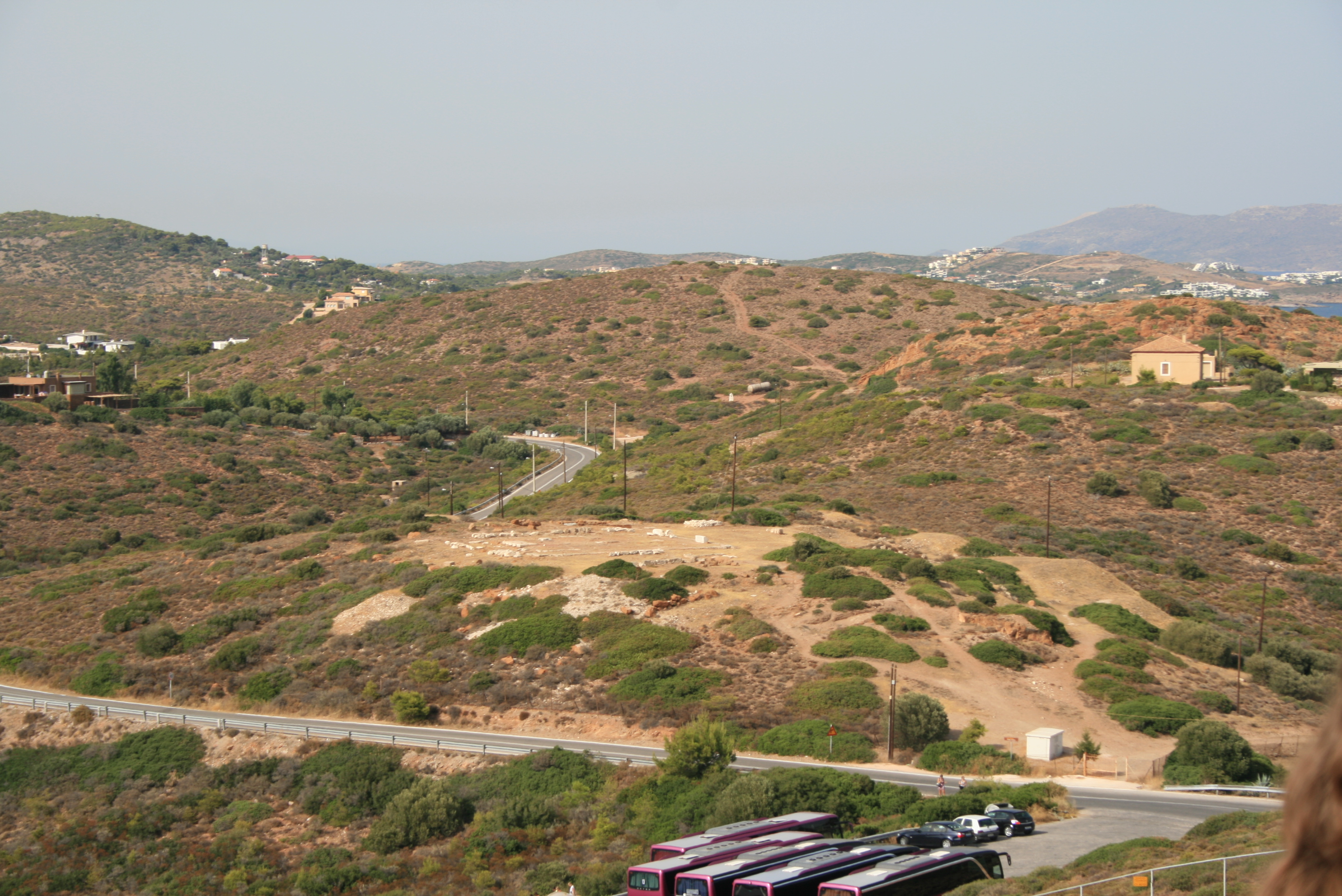 Vista de Lavrio desde lo alto de Cabo Sunio